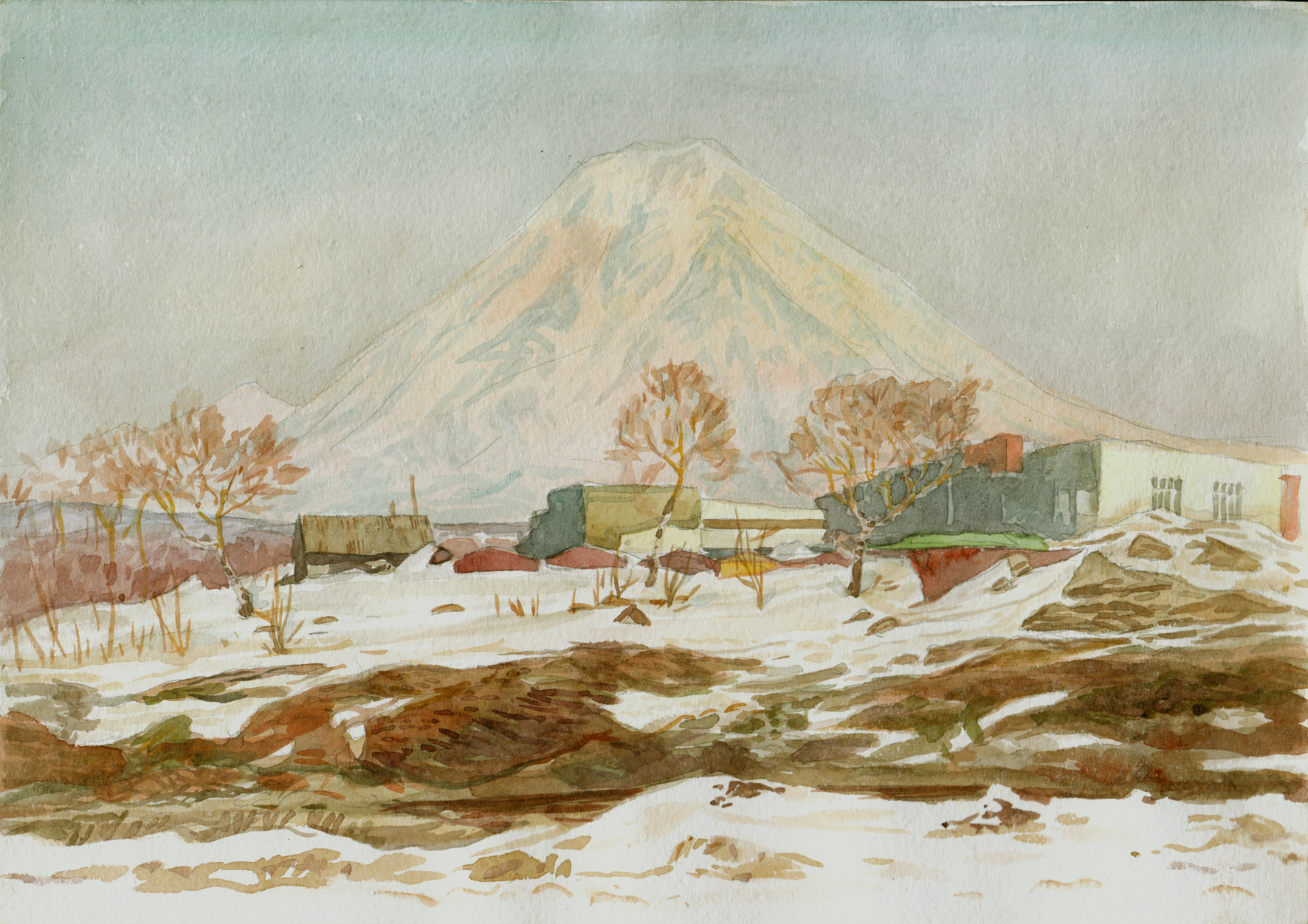 Работа сделана из окна Школы искусств Петропавловска-Камчатского во время приезда на краевой конкурс детского творчества.